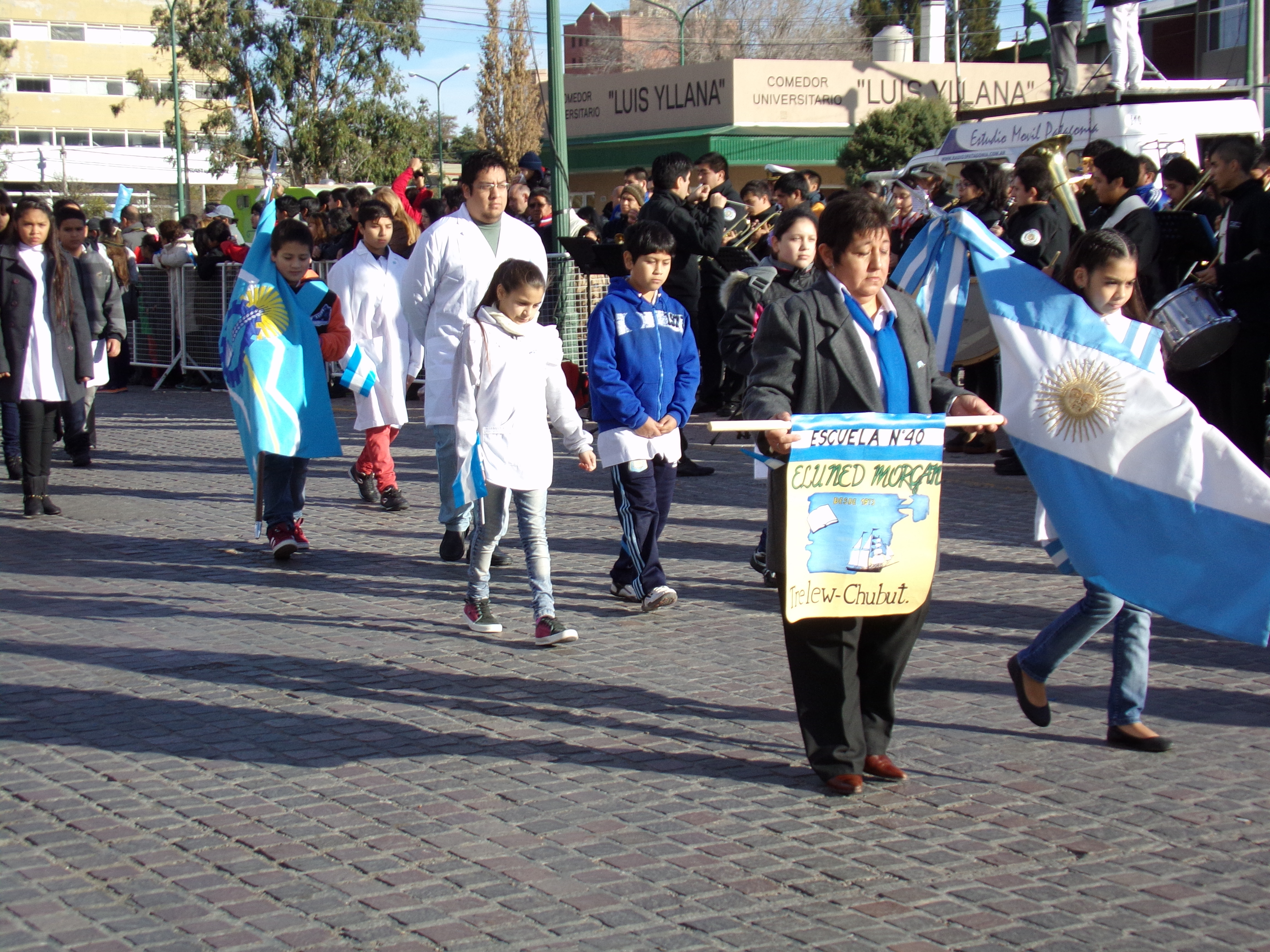 Representantes de la escuela Eluned Morgan de Trelew durante el desfile del 25 de mayo de 2015. La escuela lleva el nombre de la hija de Lewis Jones, colonos galeses.